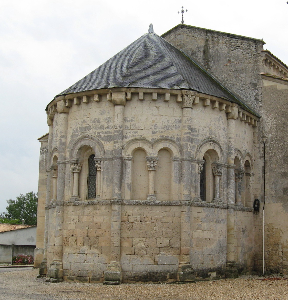 Abside, 12e s. ISMH 1925; .